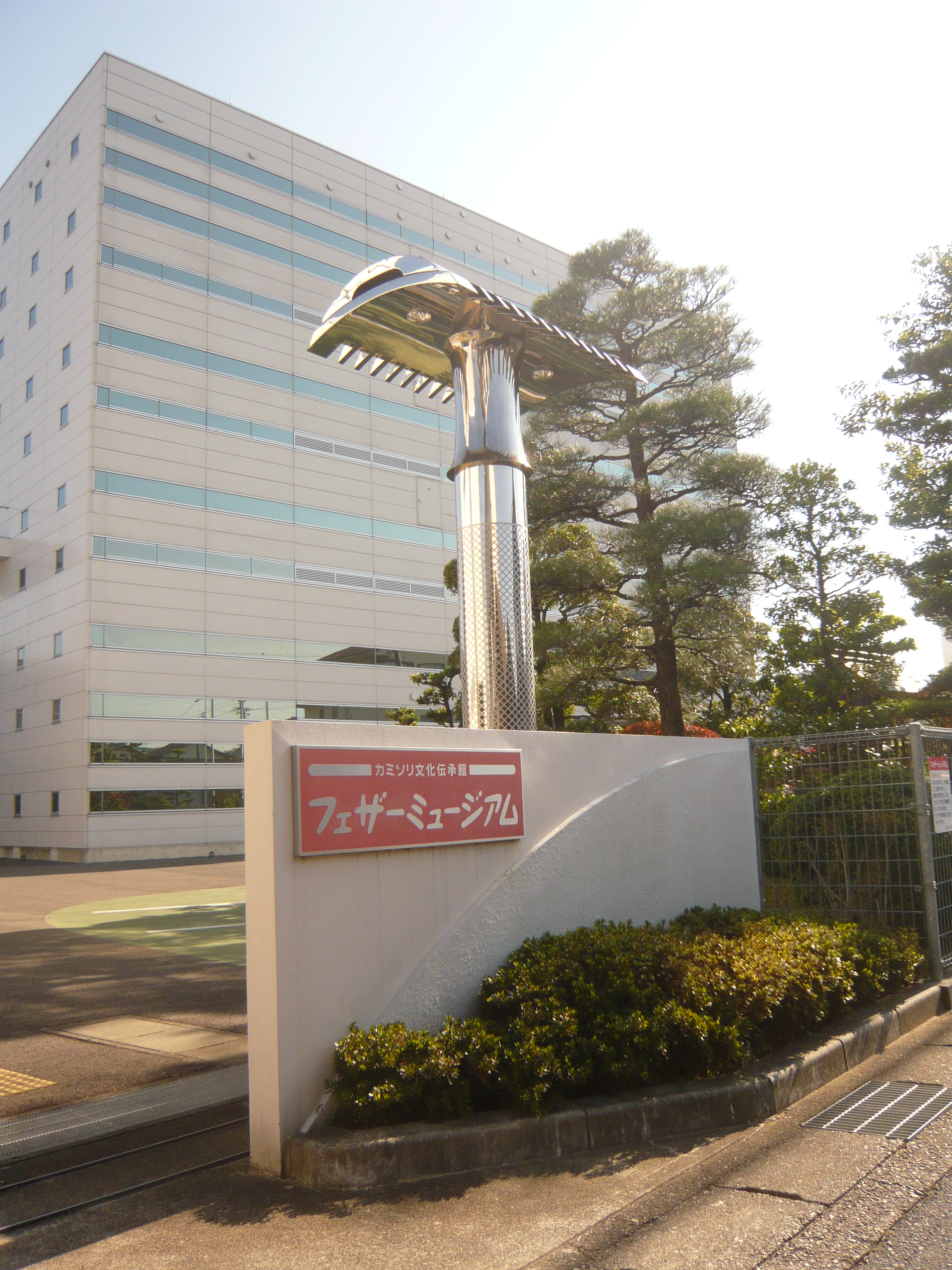 Feather Museum カミソリ文化伝承館・フェザーミュージアム（カミソリ文化伝承館・フェザーミュージアム）,Seki,Gifu,Japan（岐阜県関市）で撮影。